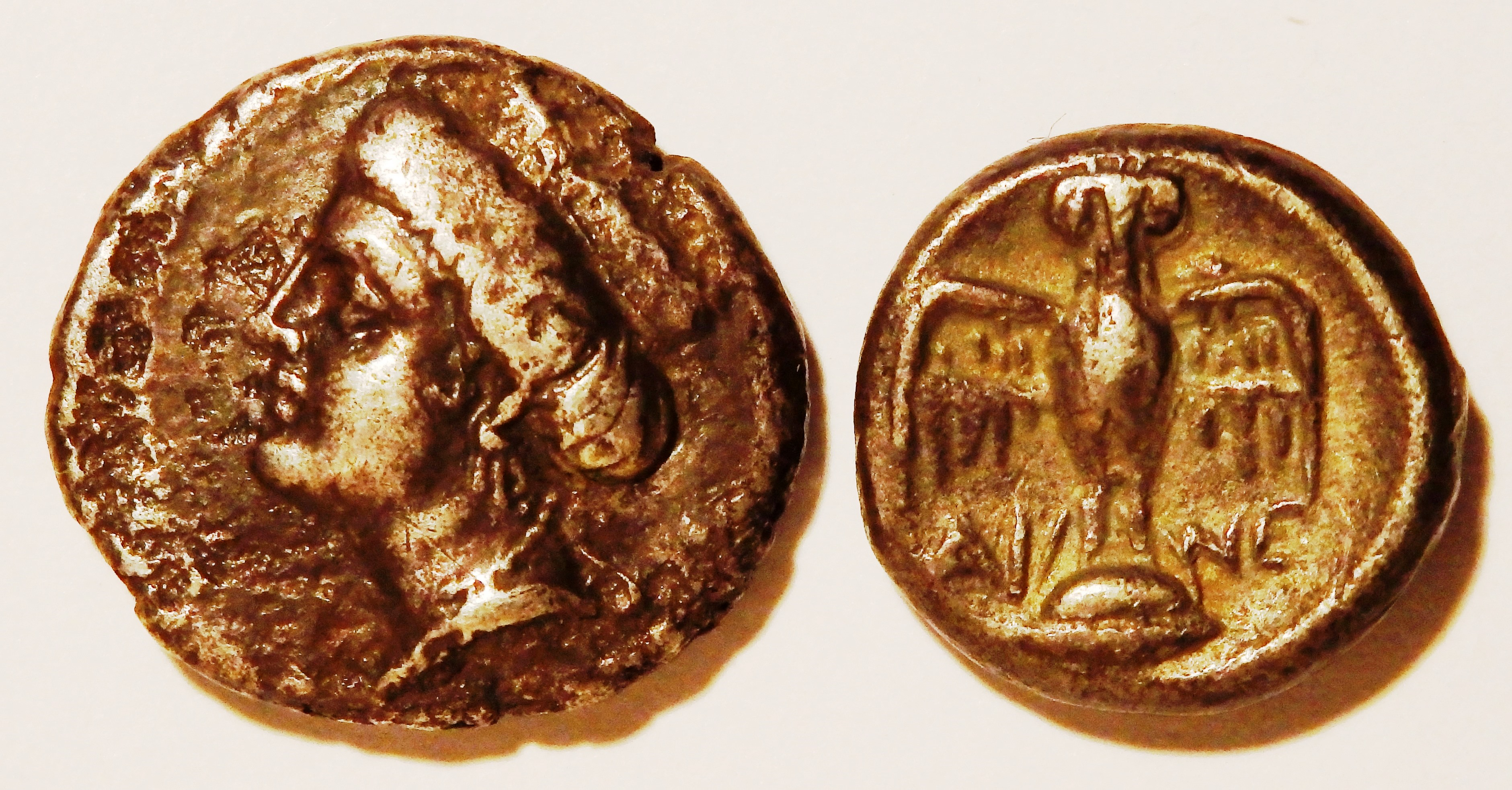 Drachme (links, Tychekopf) und Tetrobol (Eule) aus Amisos, ca. 400-350 v. Chr. geprägt, Szaivert/Sear Nr. 3605